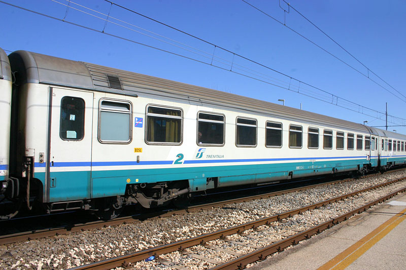 Carrozza UIC-Z1 61 83 21-90 576-1